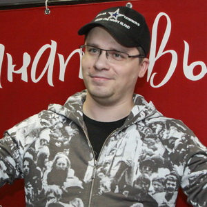 Гарик Харламов на открытии lounge-cafe «Гранатовый сад» 15 марта 2013 года.